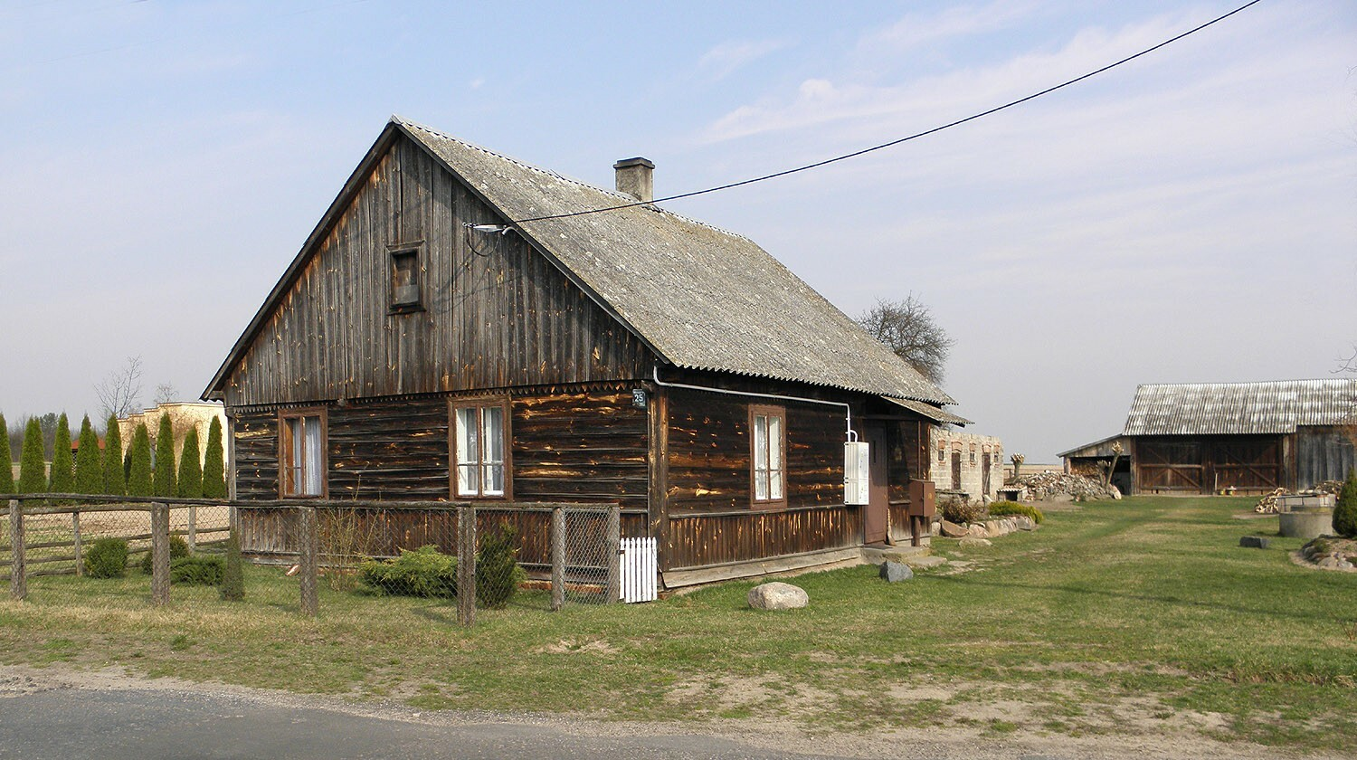 Wola Gutowska